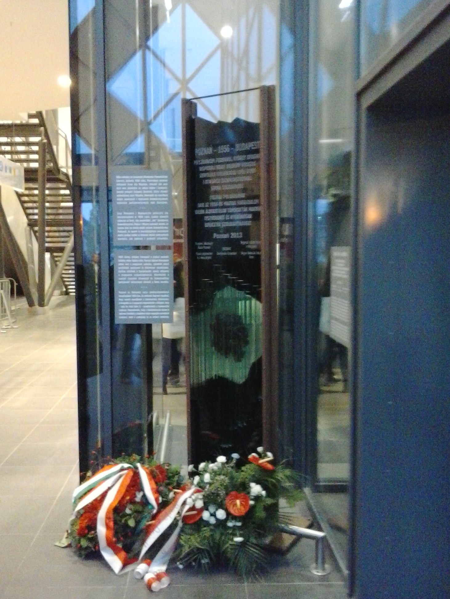 Pomnik Pomocy Węgrom w 1956 roku w Poznaniu, Poznań City Center.